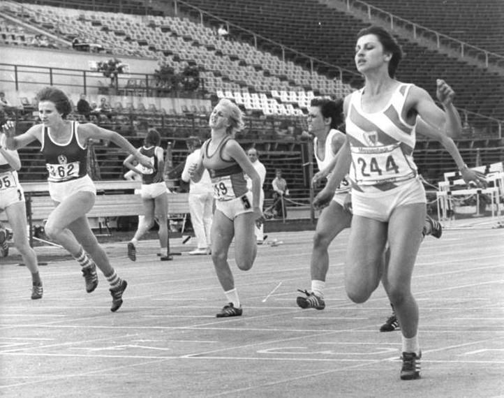 Birgit Rabe, Angela Kabel, Kerstin Walther, Dürten Behrend ADN-ZB Gahlbeck -22.07.78 Leipzig: DDR-Juniorenmeisterschaften der Leichtathleten- Im Endlauf über 100 m der Mädchen siegte am 22.7. Birgit Rabe (SC Motor Jena-r.) mit persönlicher Bestzeit von 11,53 s. Weiter von links: Angela Kabel (Nr. 395-SC Magdeburg) , Kerstin Walther (Nr. 362-SC DHfK Leipzig) und Dürten Behrend (Nr. 419-SC Neubrandenburg) .